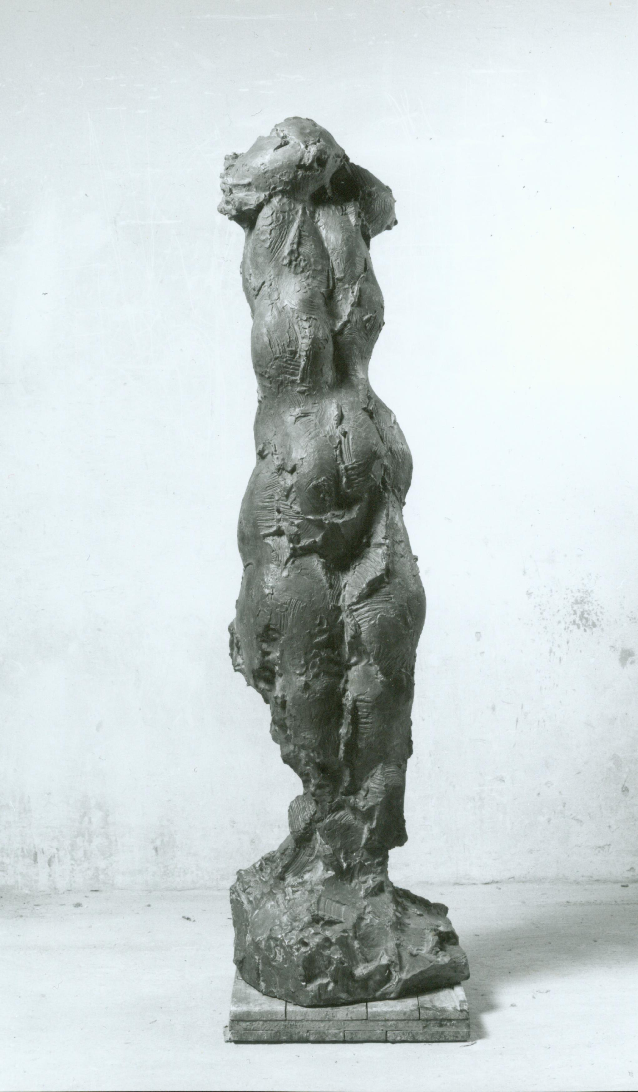 Bronze, Höhe 180cm